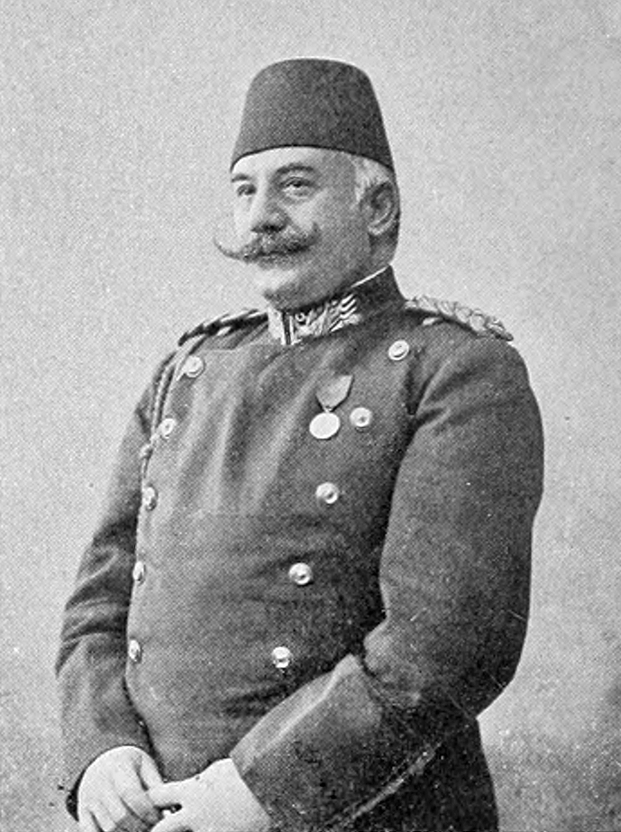 Nazim Pascha